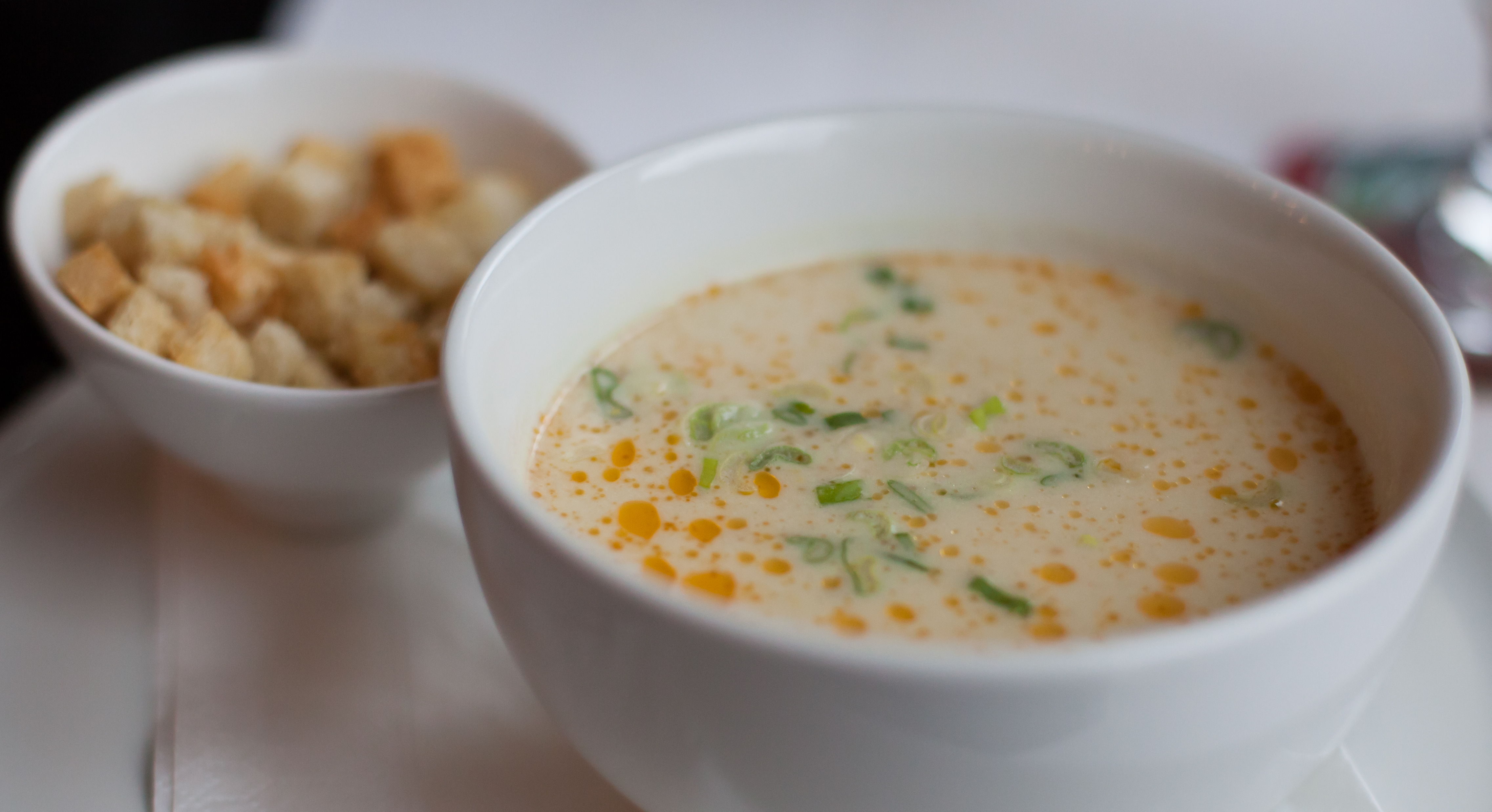 Pig & Pepper - Cluj-Napoca - Februarie 2013